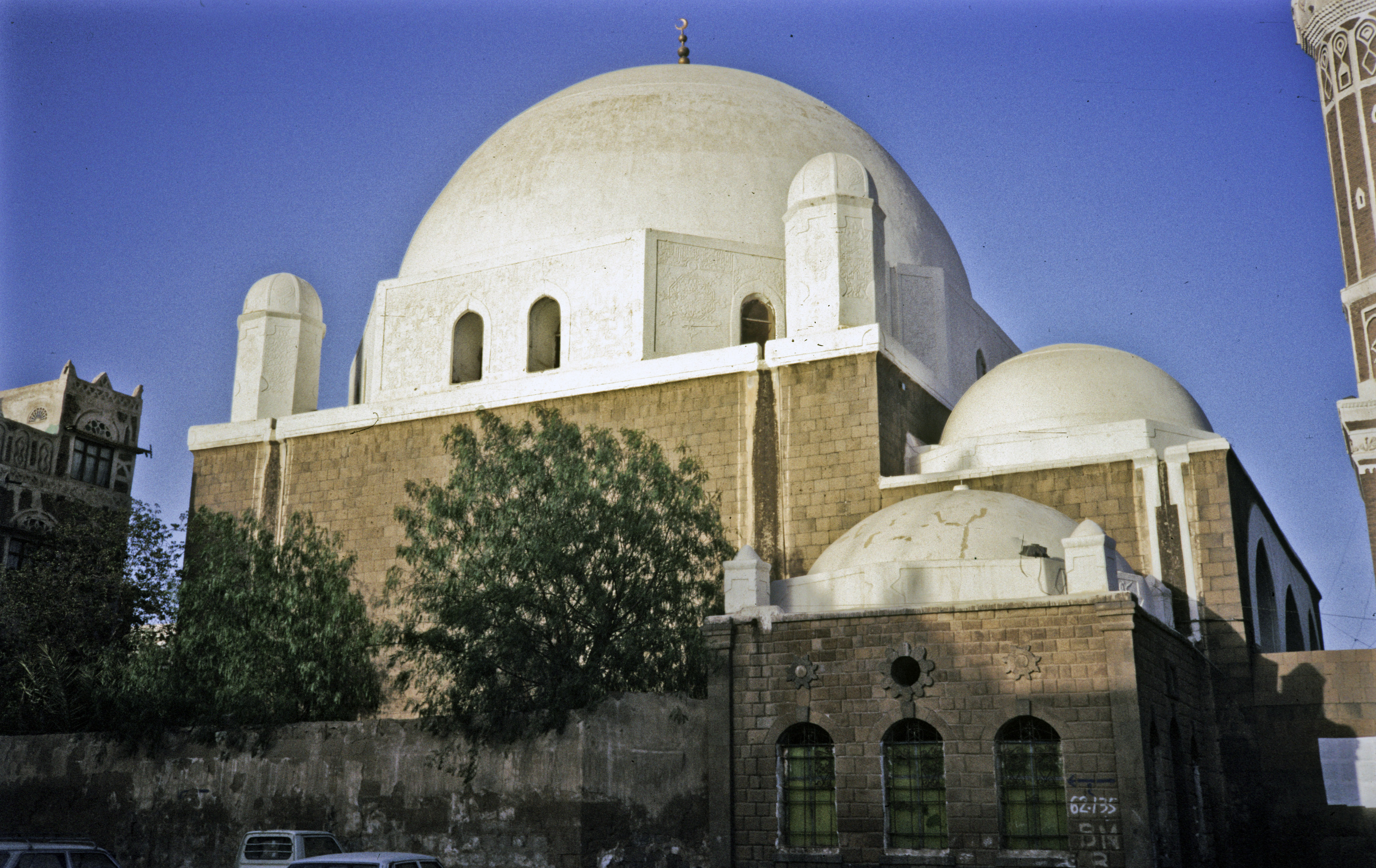 Yemen